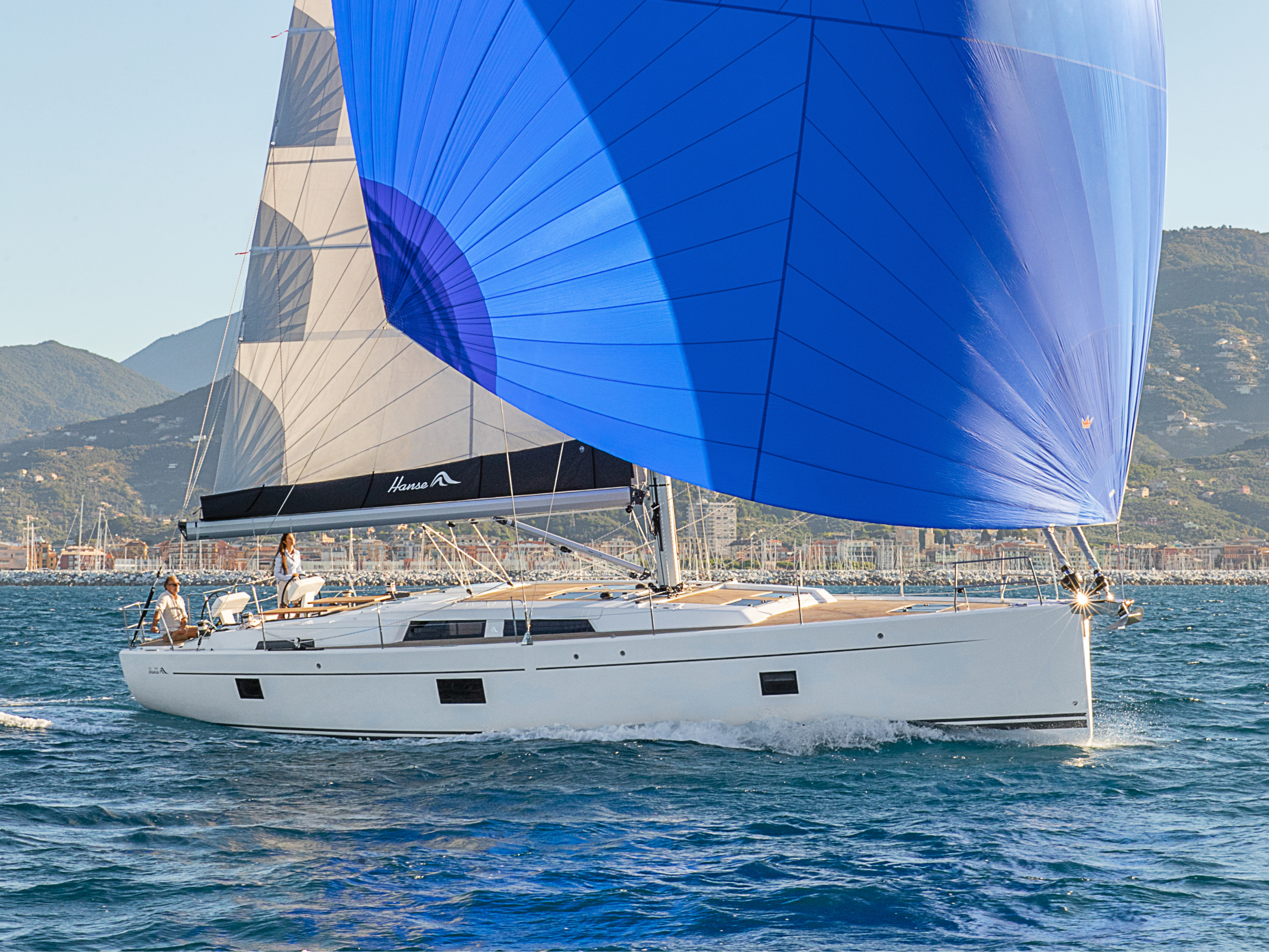 Hanse 508